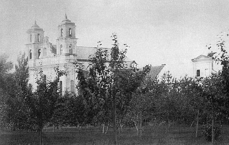 Беларуская (тарашкевіца): Сьмілавічы (Śmiłavičy). Касьцёл і кляштар місіянэраў